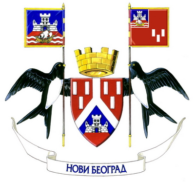 Das große Wappen der Stadt und Gemeinde Novi Beograd